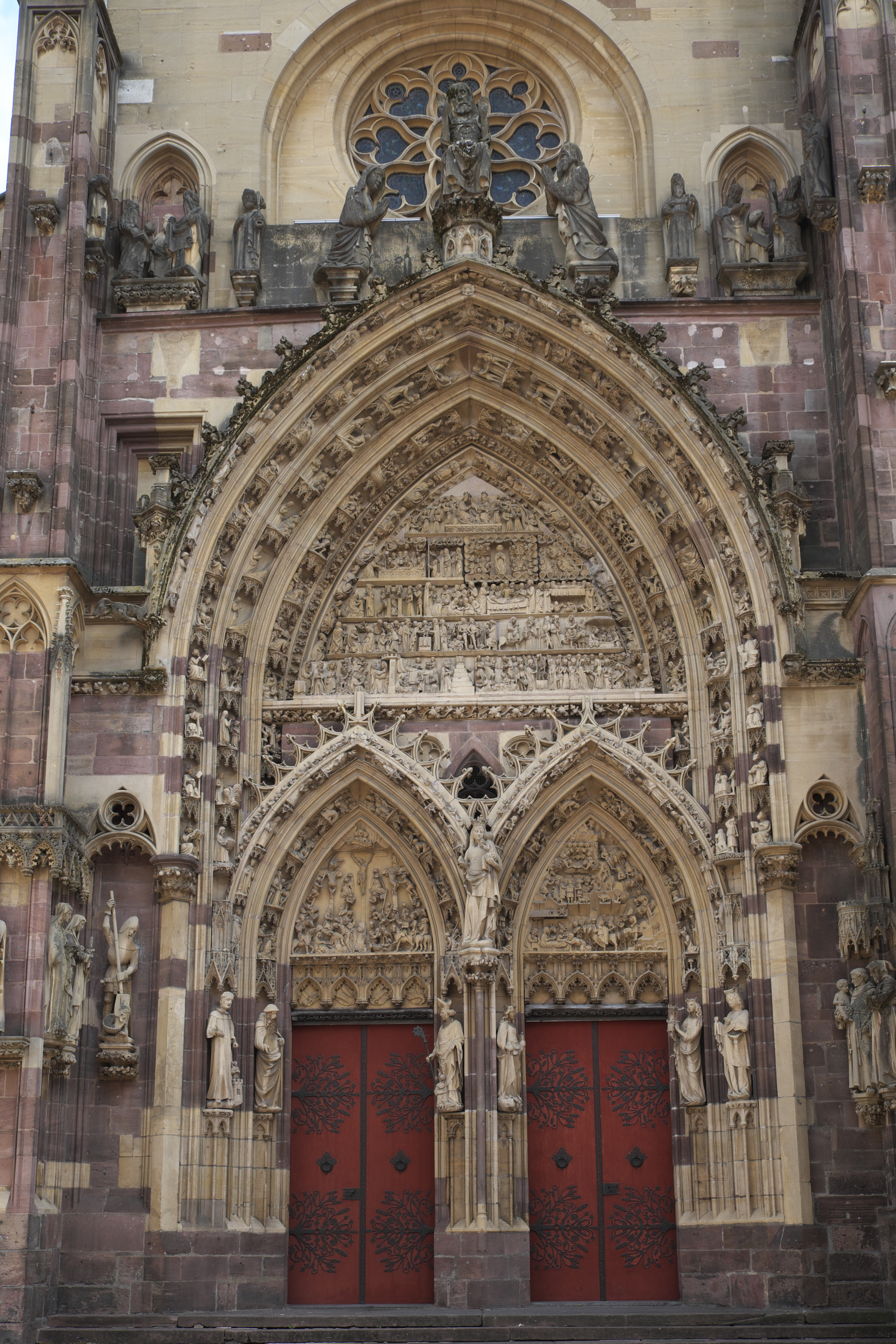 Ehemalige Stiftskirche, katholische Pfarrkirche Saint-Thiébaut in Thann im Département Haut-Rhin (Elsass/Frankreich), Westportal